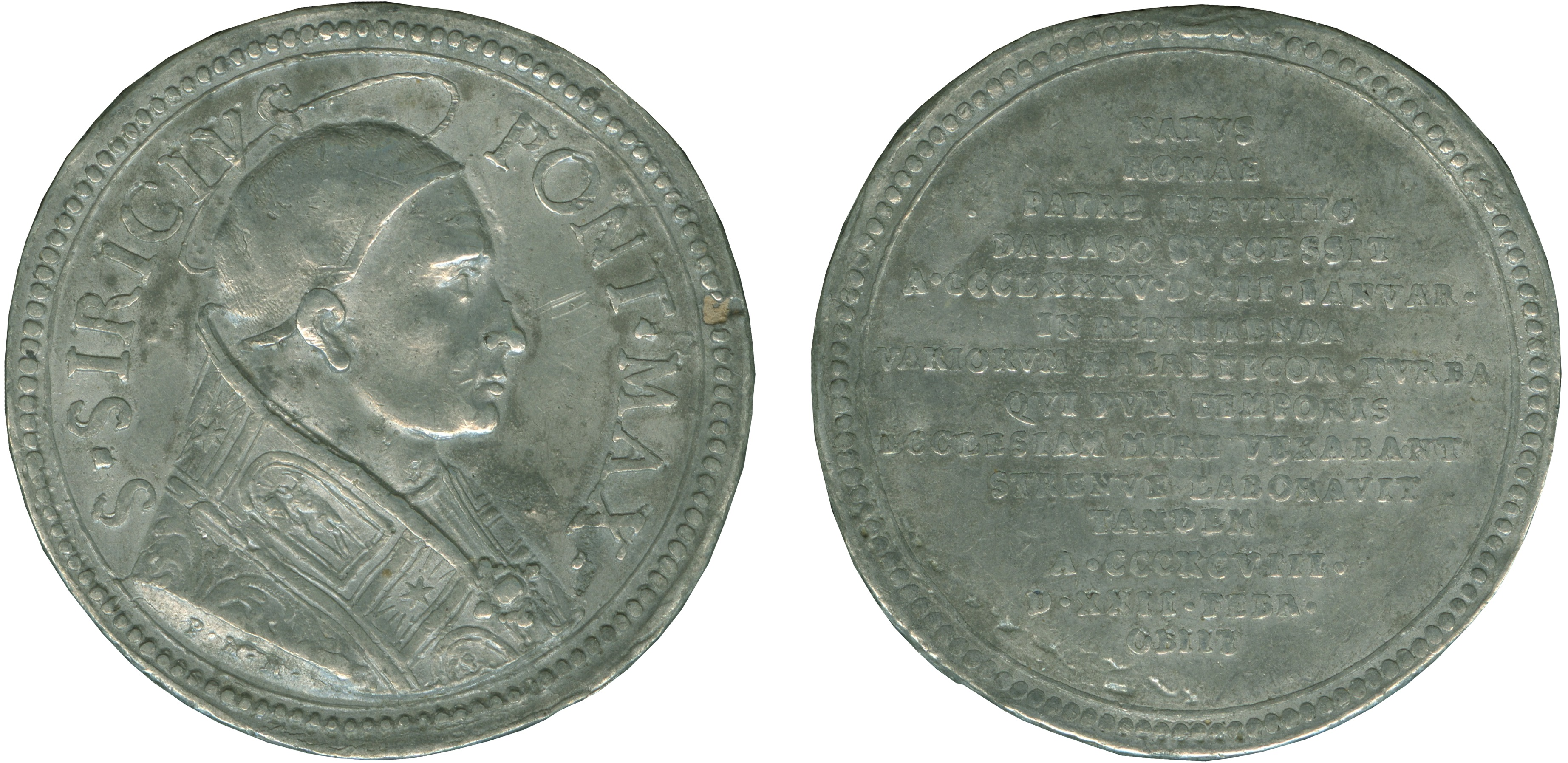 Zimm Medaille des Siricius mit Lebensdaten auf der Rv.